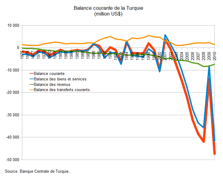 Balance courante de la Turquie - Source: Banque Centrale de Turquie.